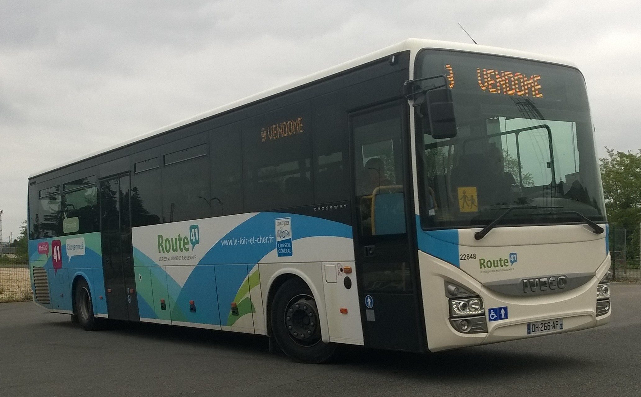 Autocar de ligne régulière 9 de Blois (Gare Routière) à destination de Vendôme Iveco Bus Crossway N°22848 du réseau Route41